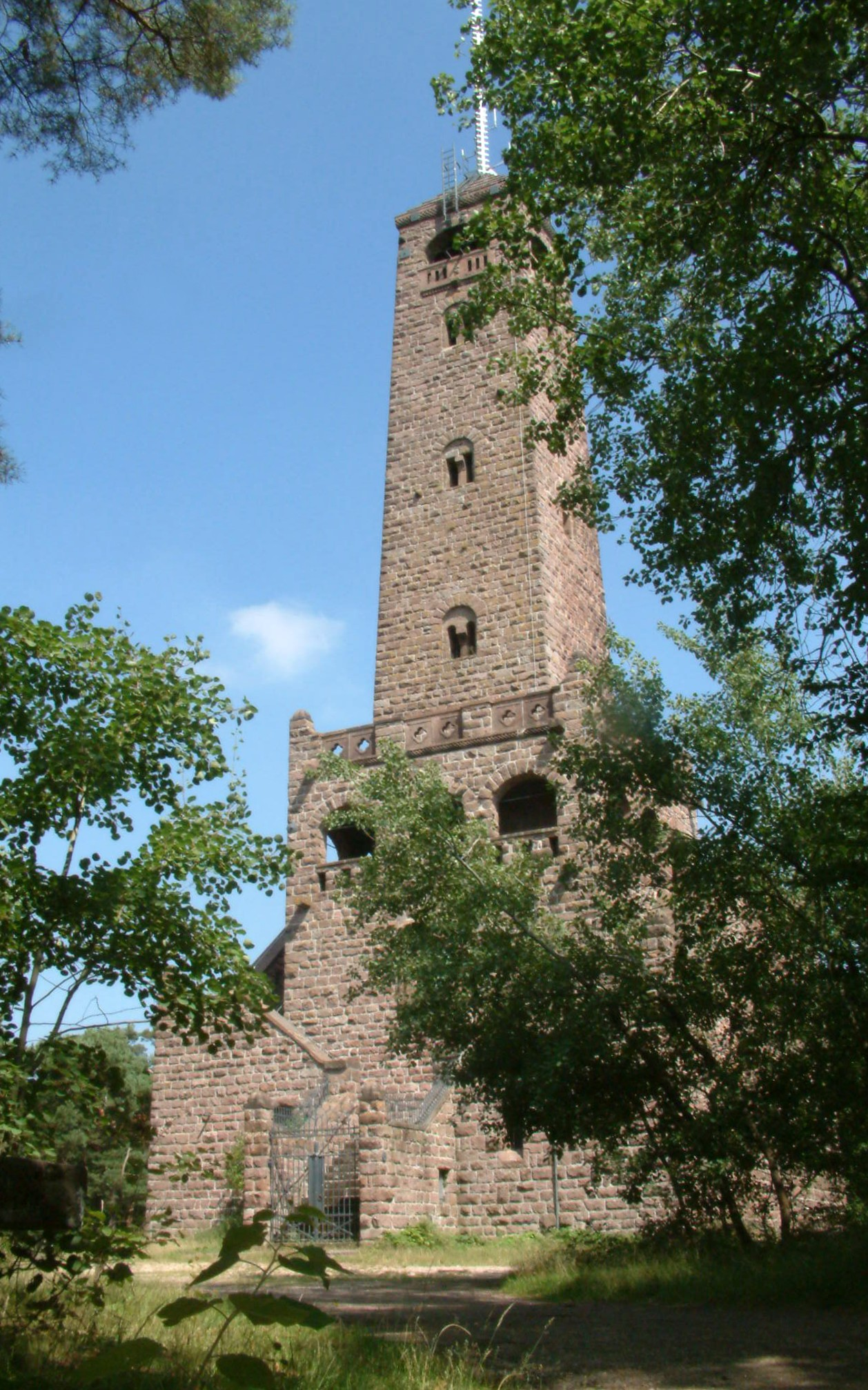 Bismarckturm (Kallstadt) on Peterskopf, 49° 28' 45" N, 8° 7' 47" O